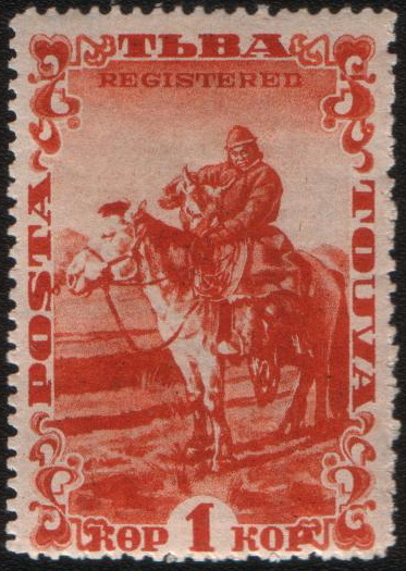 Почтовая марка Тувинской Народной Республики, 1933. Охотник на коне.